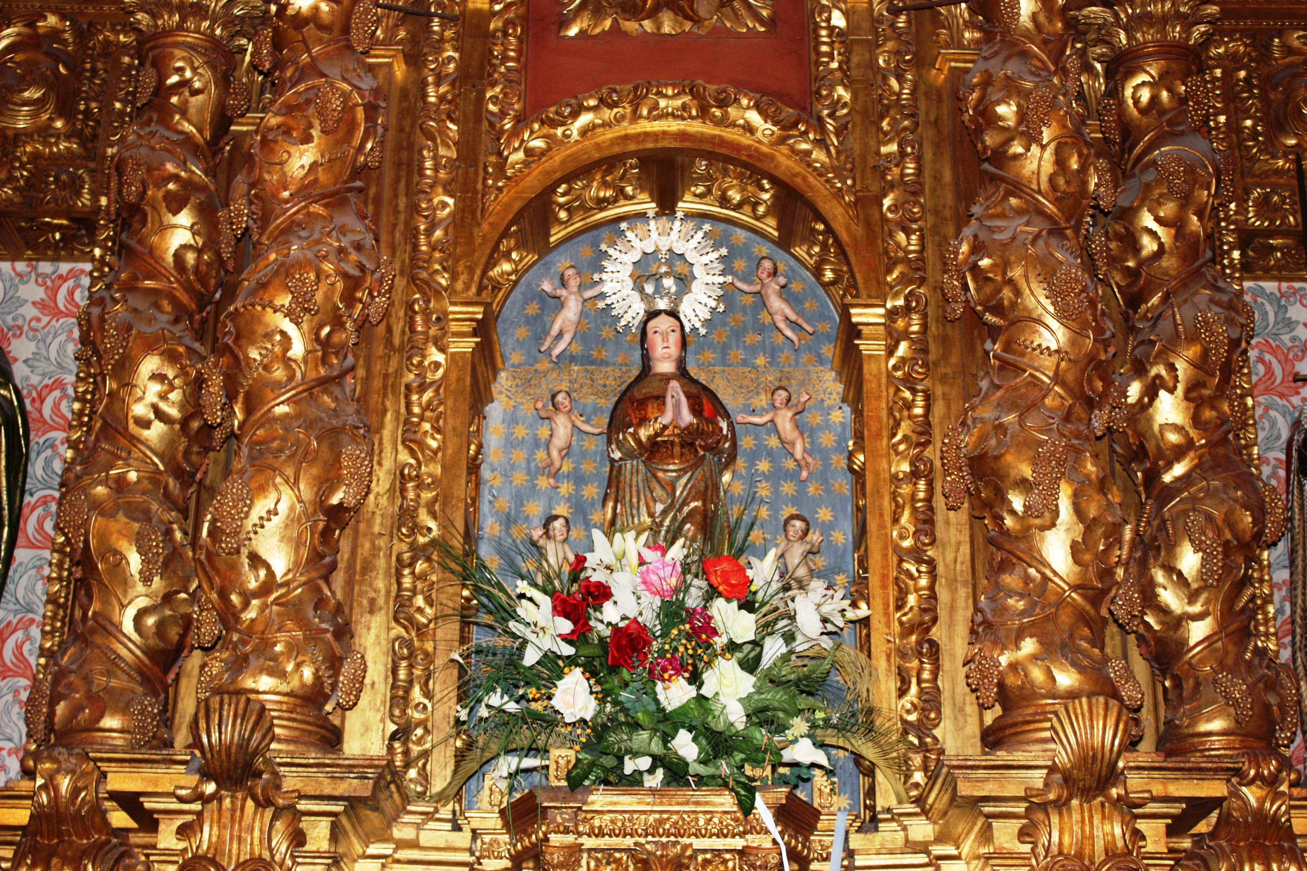 Santuario de Contrueces